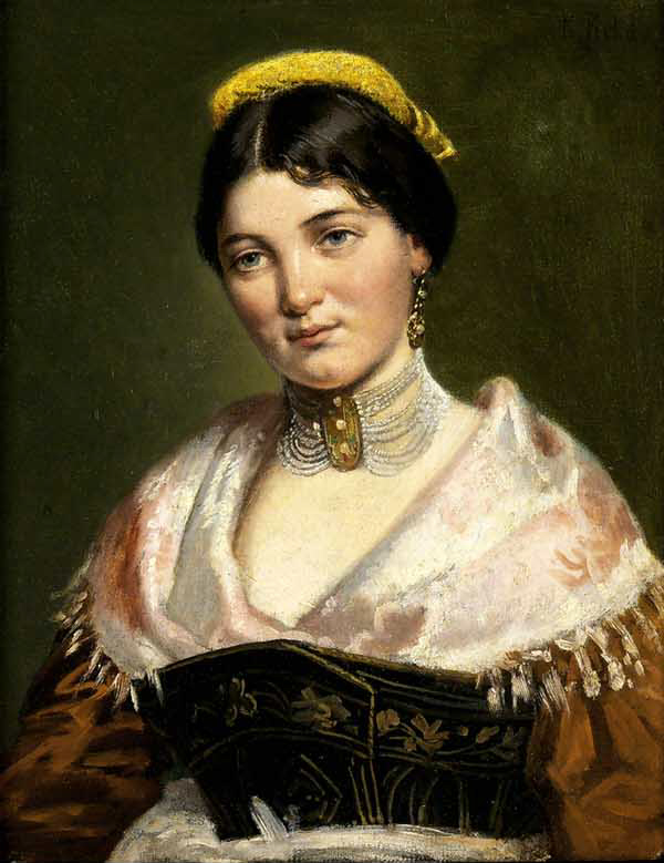 Mädchenporträt (mit Kropfkette in Trachtenkleidung)